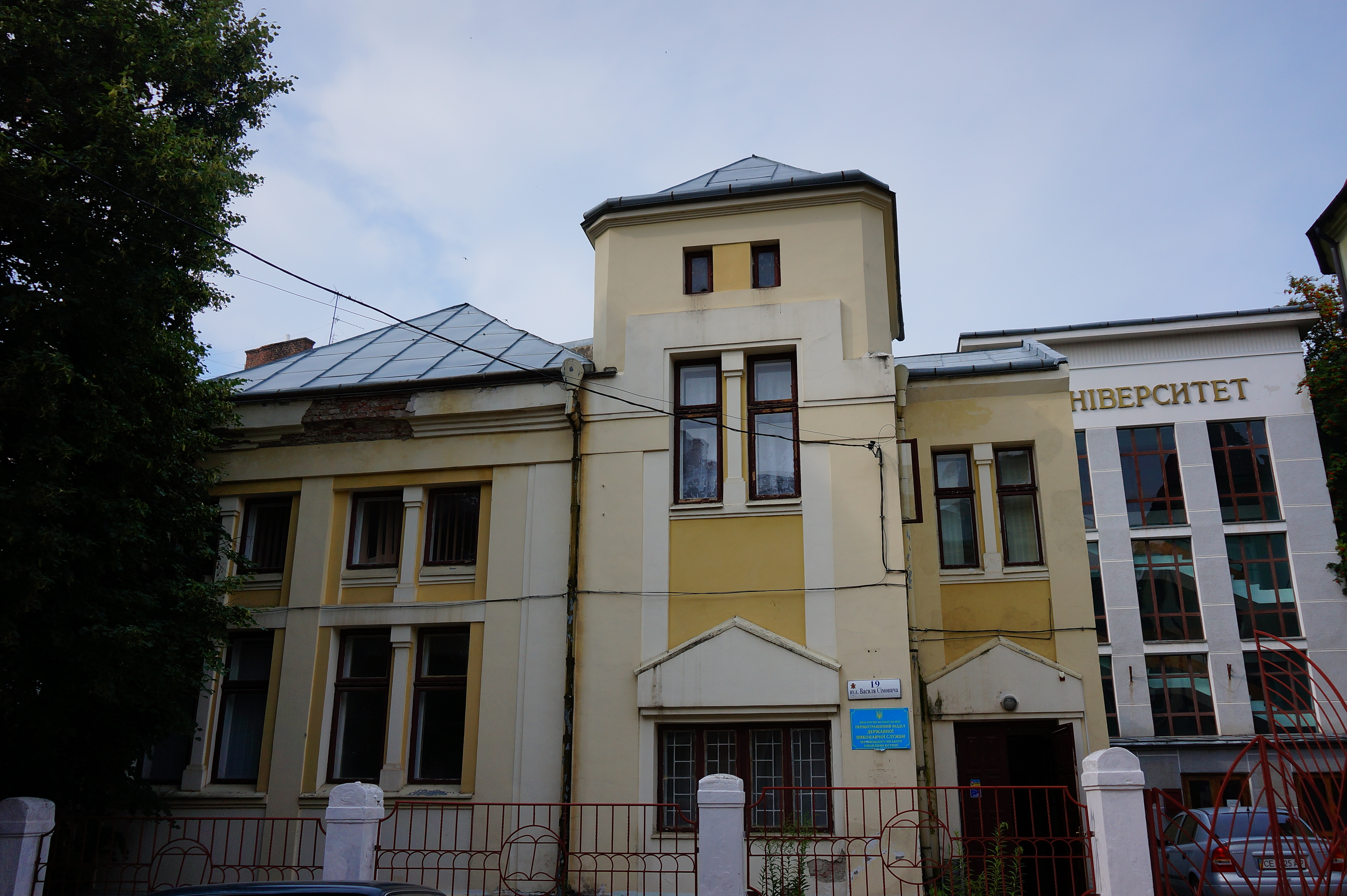 Синагога, Чернівці, Сімовича Василя, 19